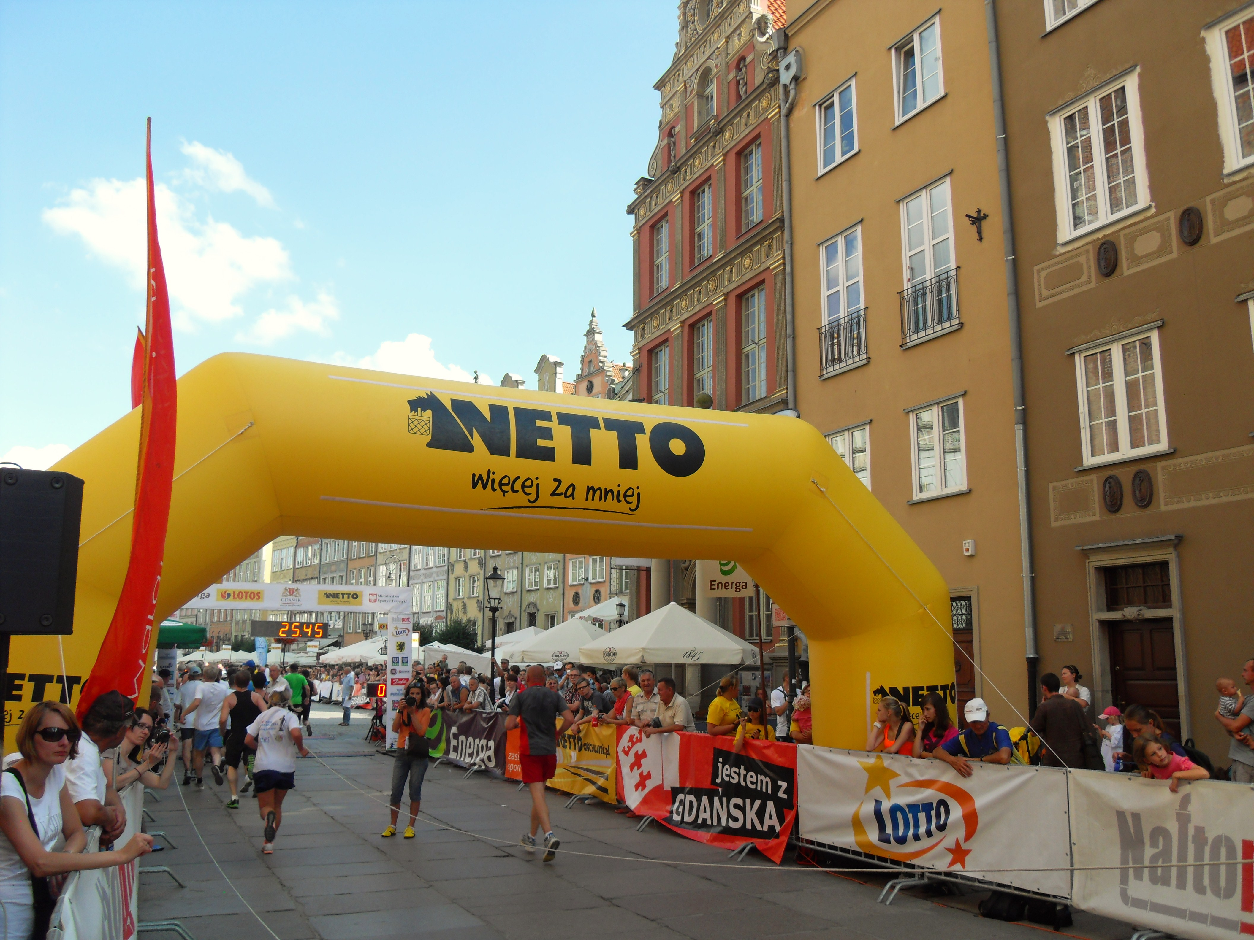 Gdańsk Główne Miasto, ul. Długa. Bieg św. Dominika w 2012 r.